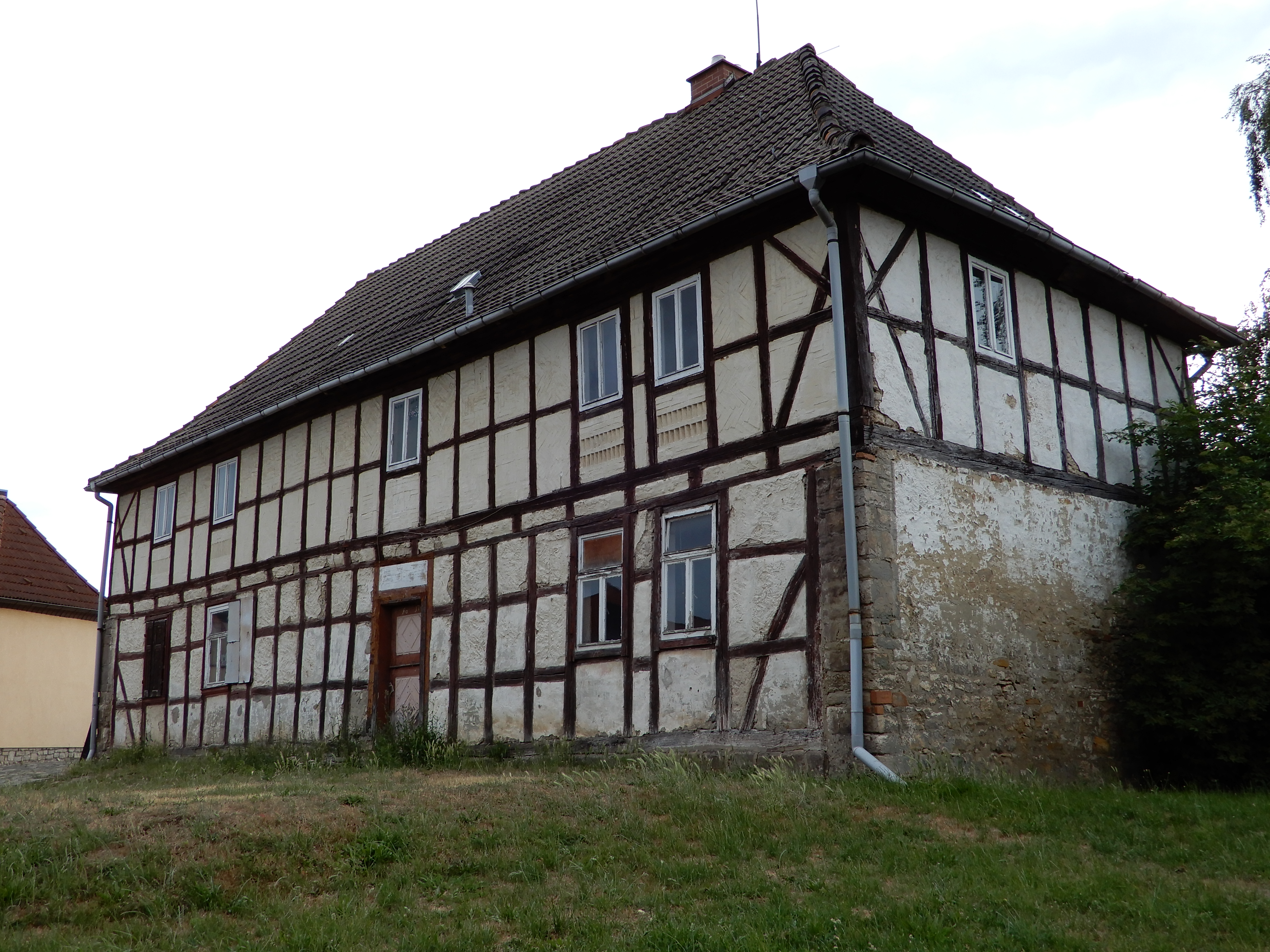 Haus Unter dem Turm 1, Anno 1746